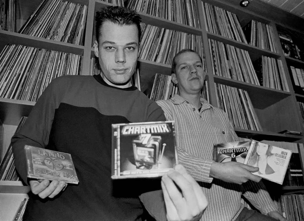 DJ Deep (rechts) und DJ Studio 33 (links), März 2001